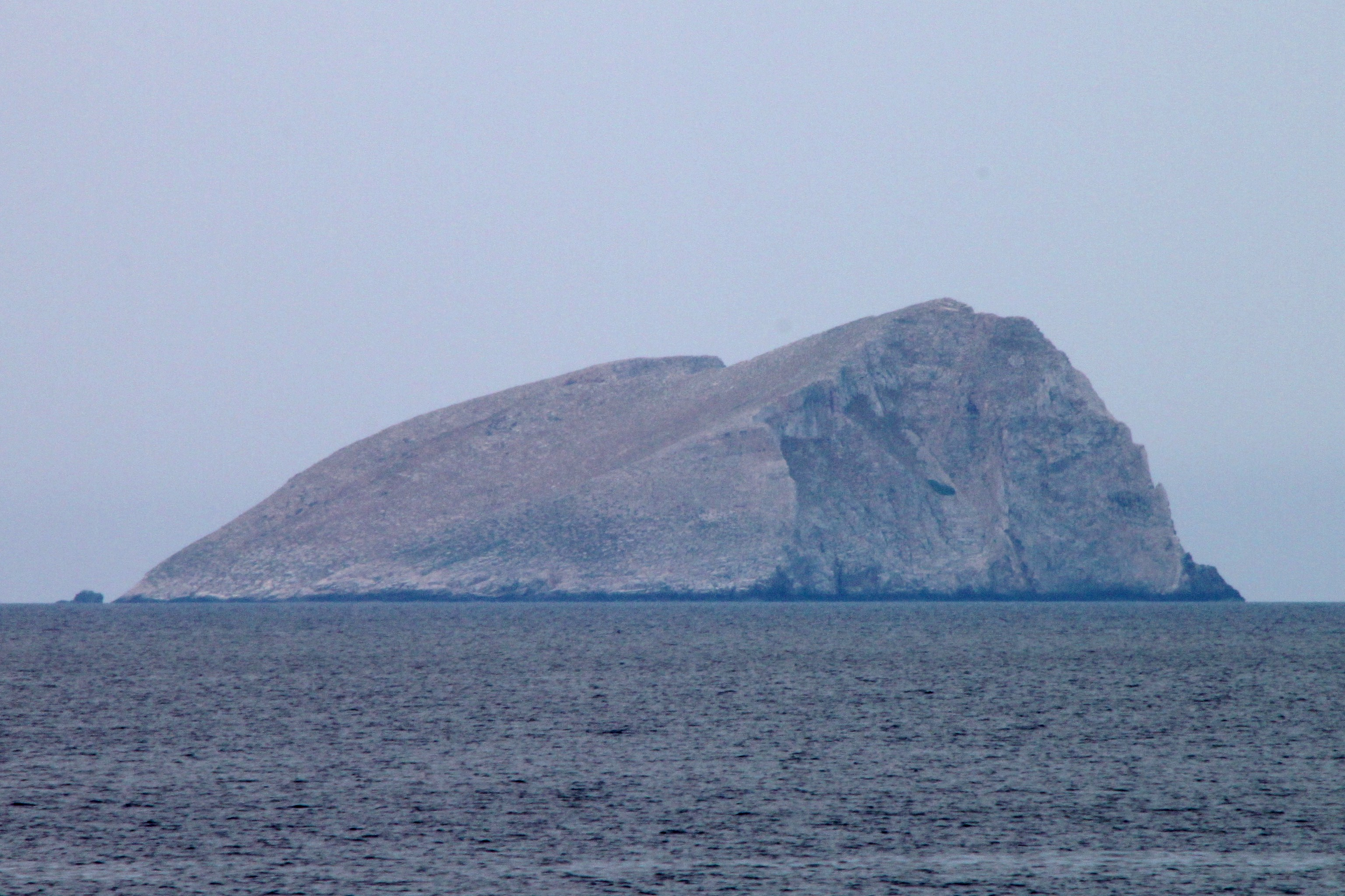 Pondikonisi, Felsinsel in der Gemeinde Kissamos, Präfektur Chania, Kreta, Griechenland